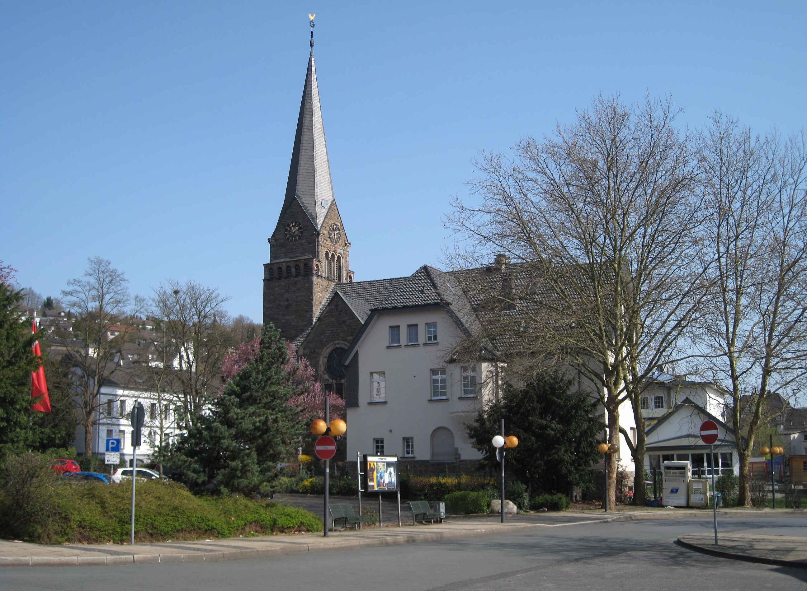 Evangelische Johanniskirche und Pfarrhaus in Plettenberg-Eiringhausen. This image shows a heritage building in Germany, located in the North Rhine-Westphalian city Plettenberg (no. 6 (Kirche) und 7 (Pfarrhaus)).